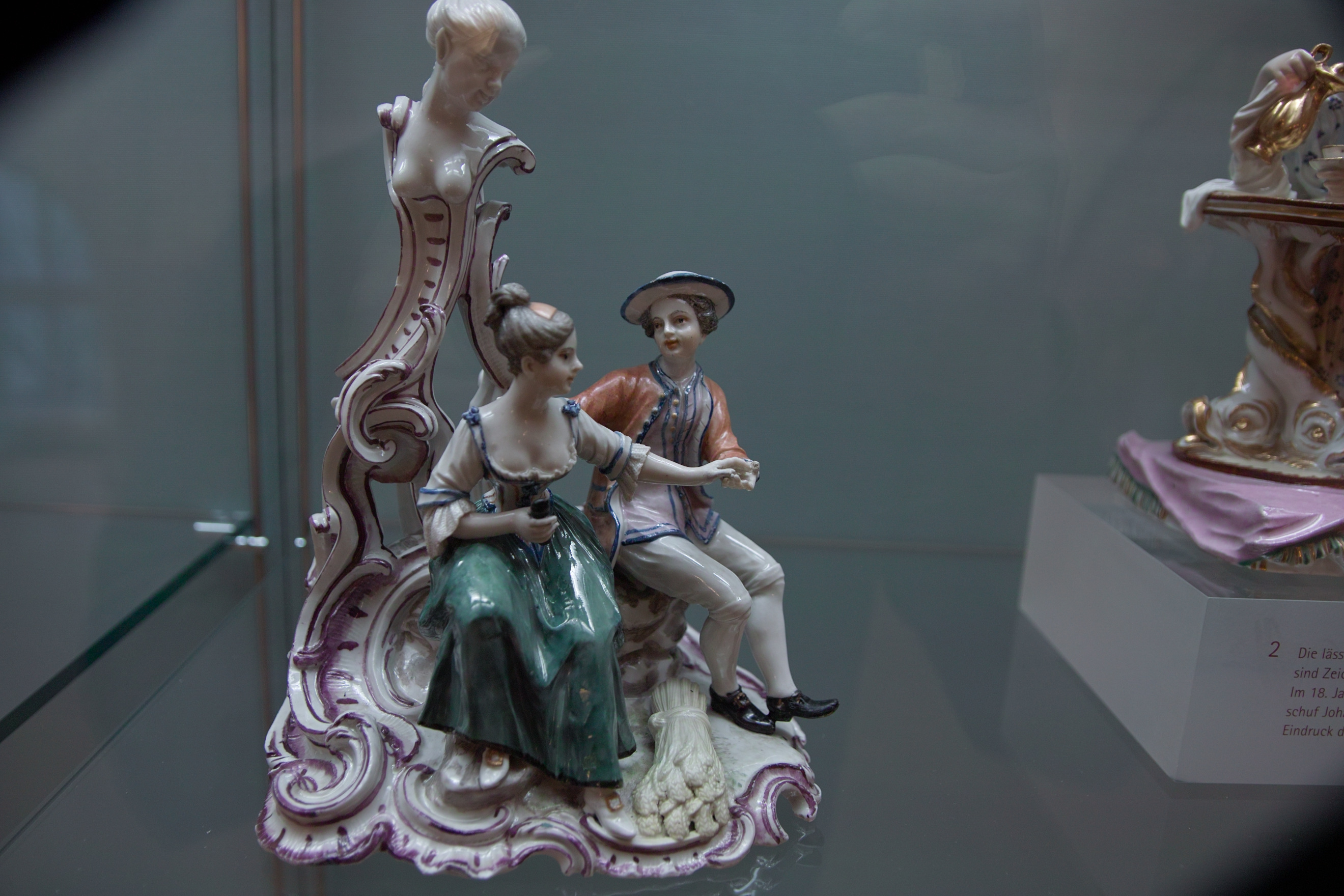 Der Sommer, dargestellt als Paar vor einer Rocaille-Kulisse. Ludwigsburg 1760-1762. Modell von Johann Göz. (Nach Museumsbeschriftung)